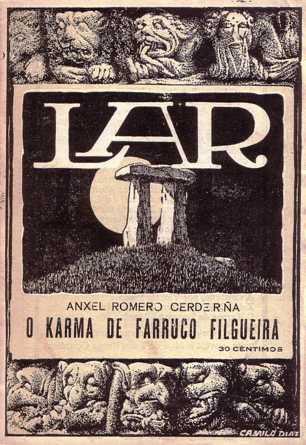 24 O karma de Farruco Filgueira. Ánxel Romero Cerdeiriña. Lar. 1926.jpg